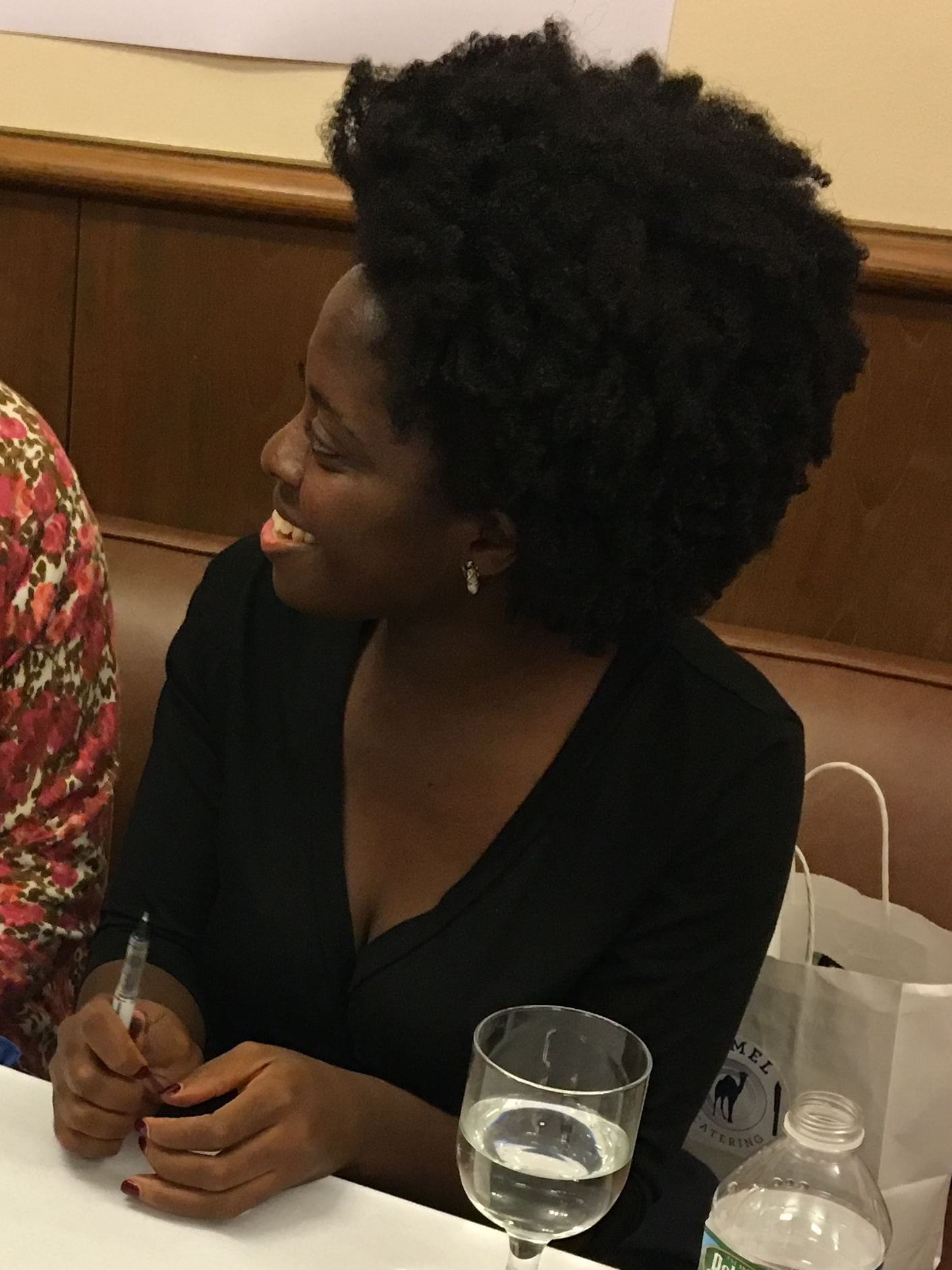 Yaa Gyasi, 9/27